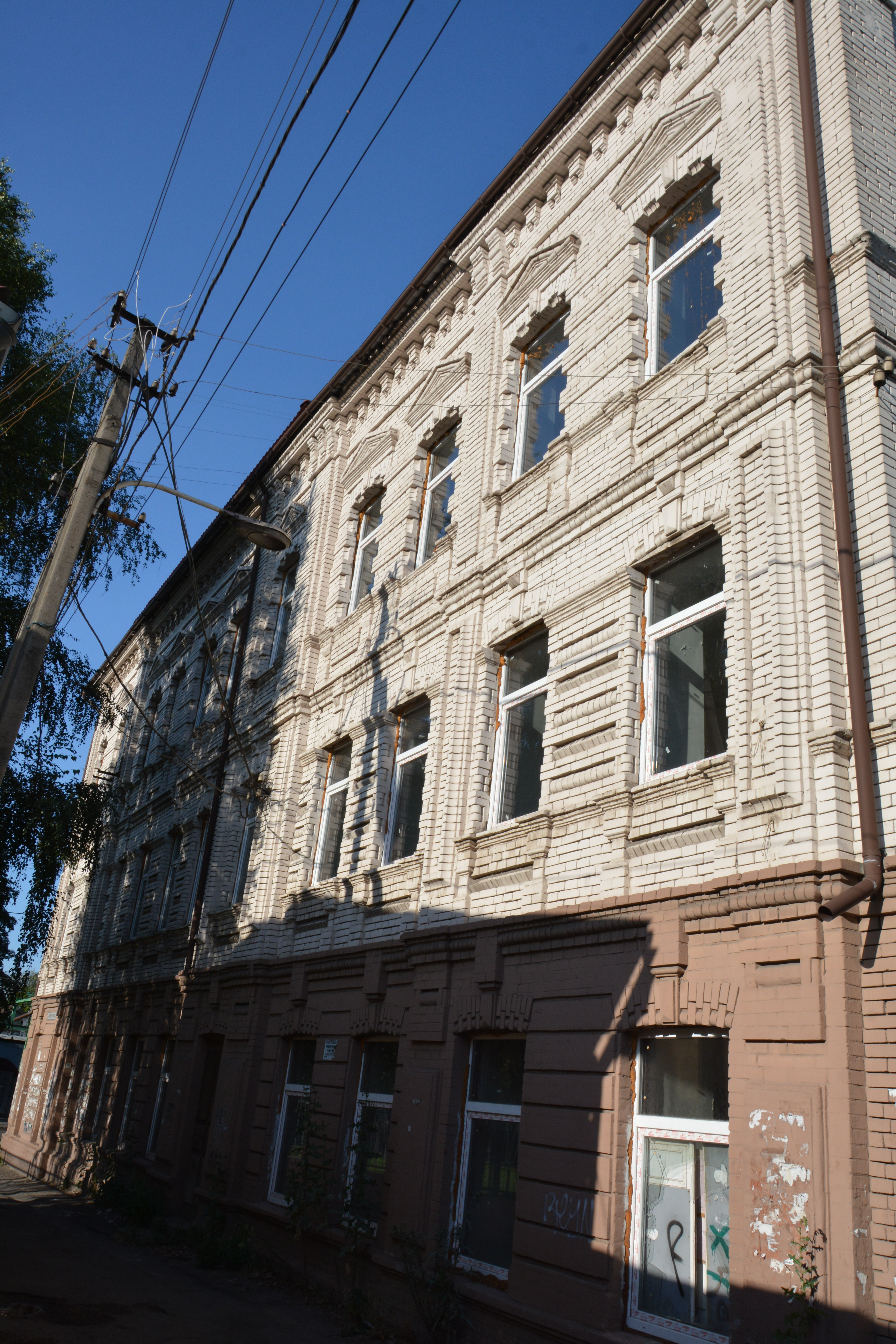 Будинок, в якому знаходився ревком та Катеринославський комітет КП(б)У Мем. дошка, Дніпропетровськ, пр-т С. Нігояна, 33а